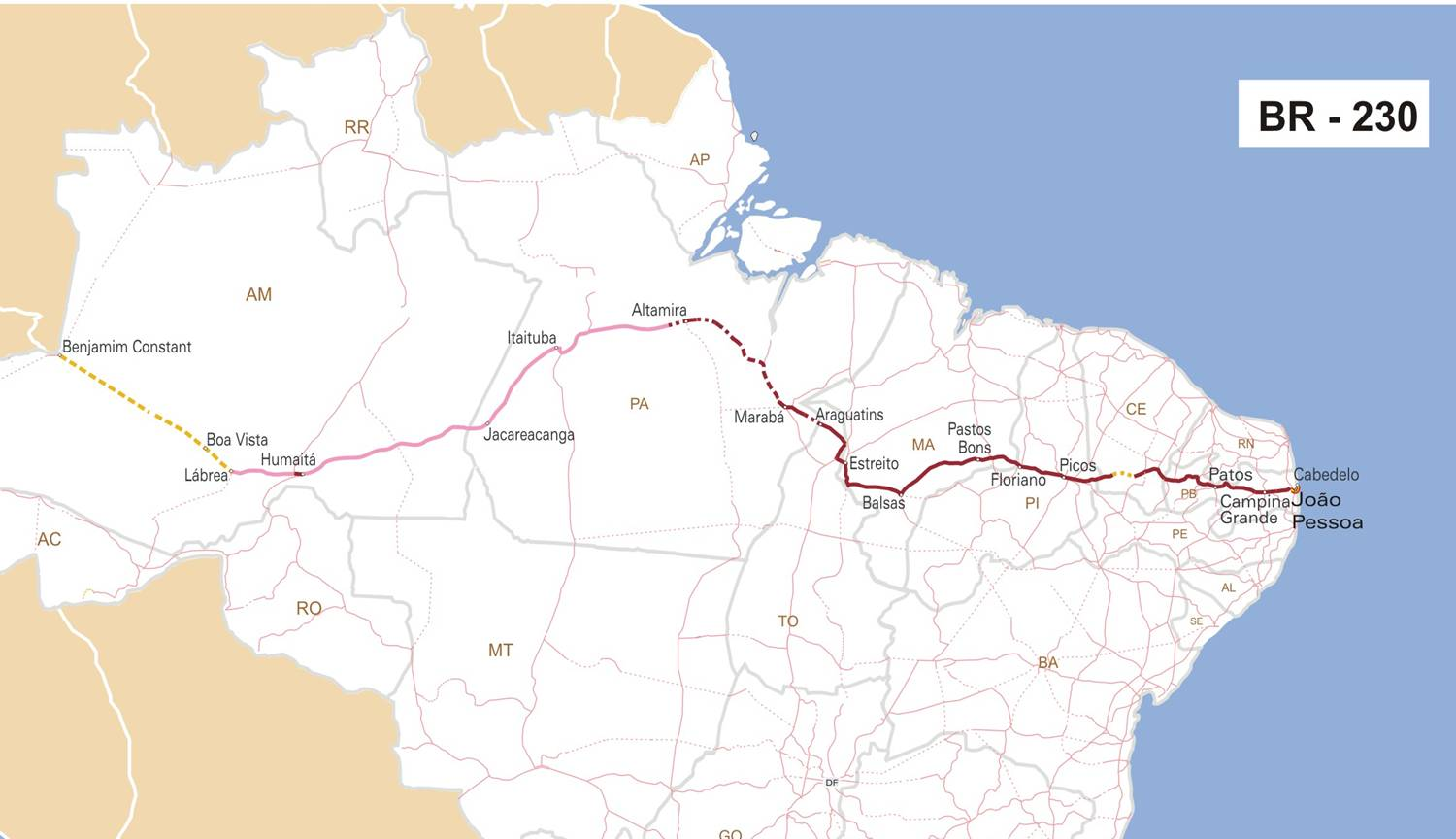 Mapa descritivo da BR-230 em relação as outras rodovias brasileiras.